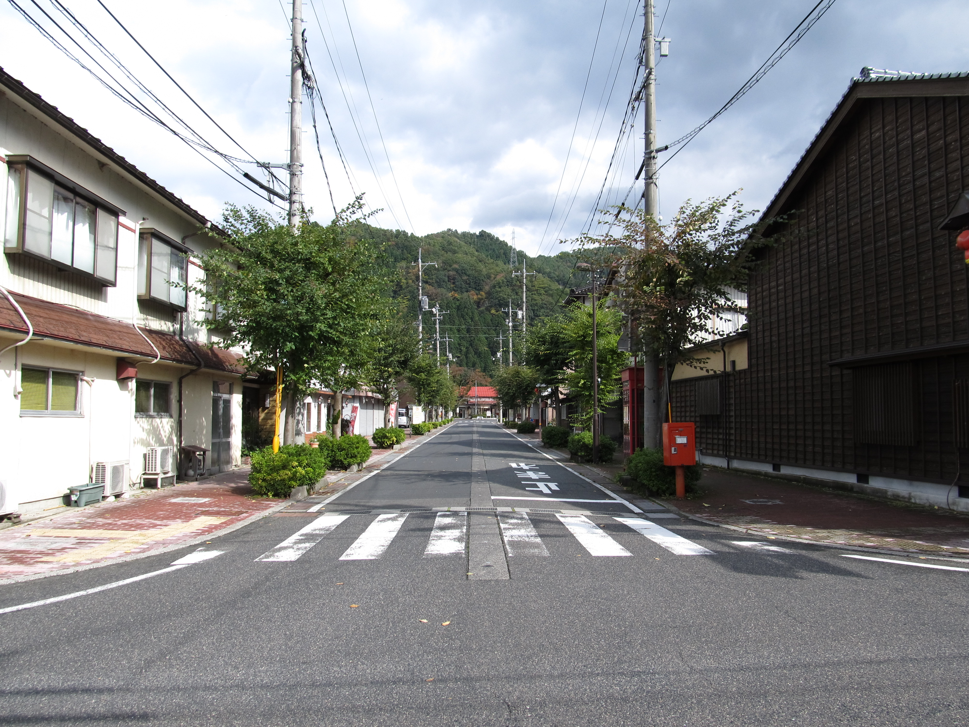 鳥取県道176号若桜停車場線。奥に進むと若桜鉄道の若桜駅がある。 この交差点は鳥取県道103号若桜湯村温泉線の起点でもある。